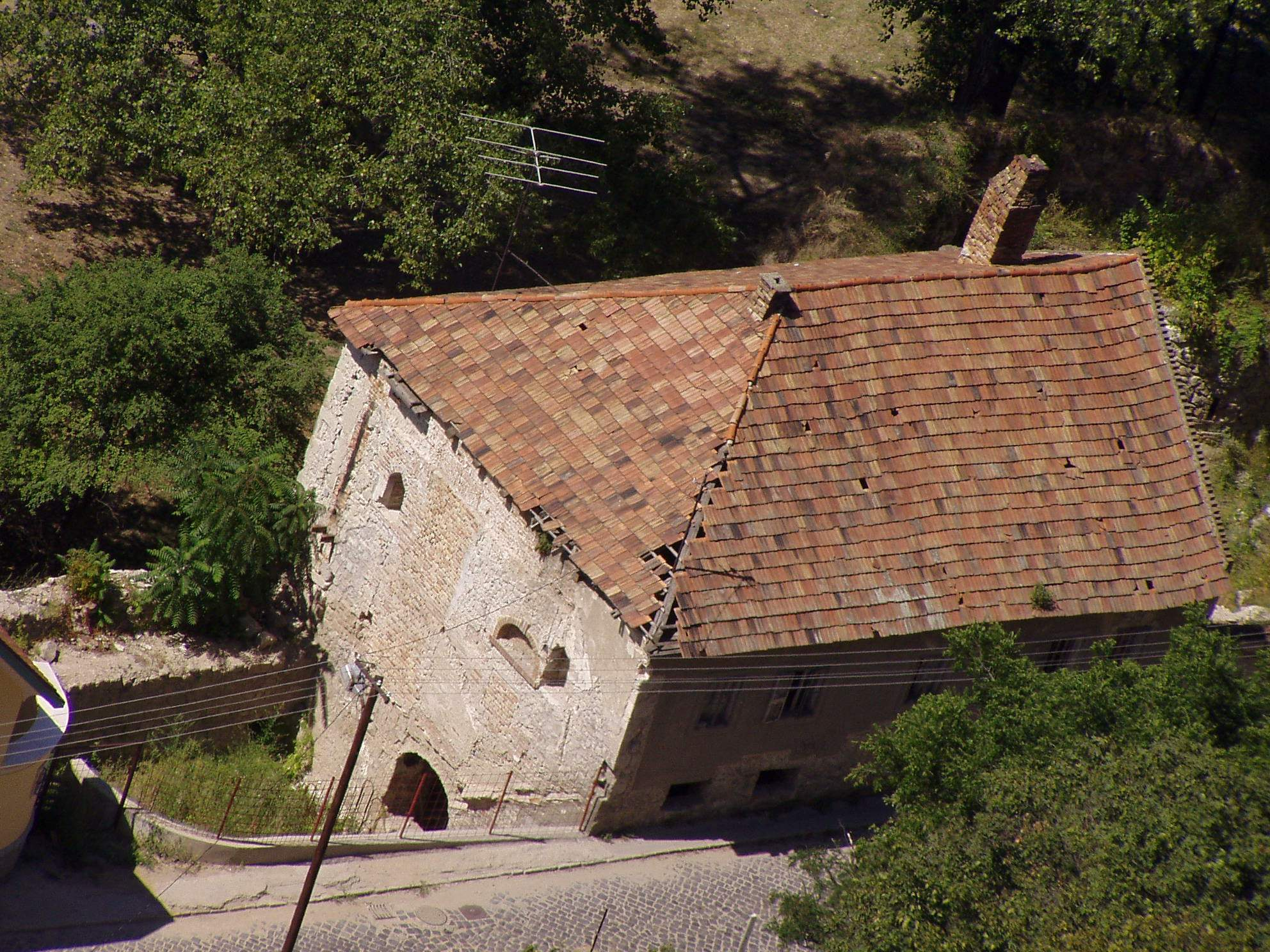 A dzsámi épülete a felújítások előtt